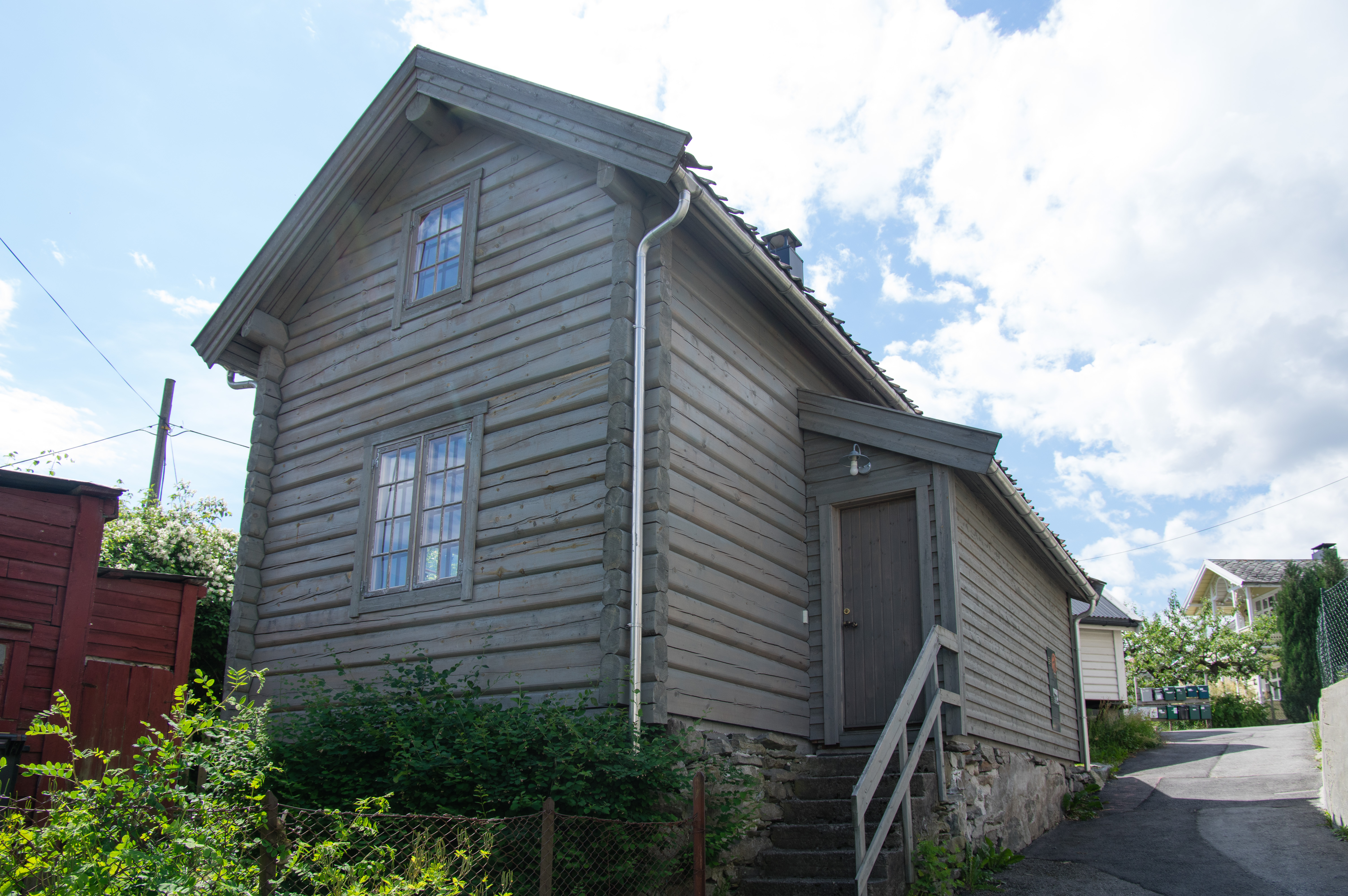 Gjest Baardsen-huset i Sogndal.